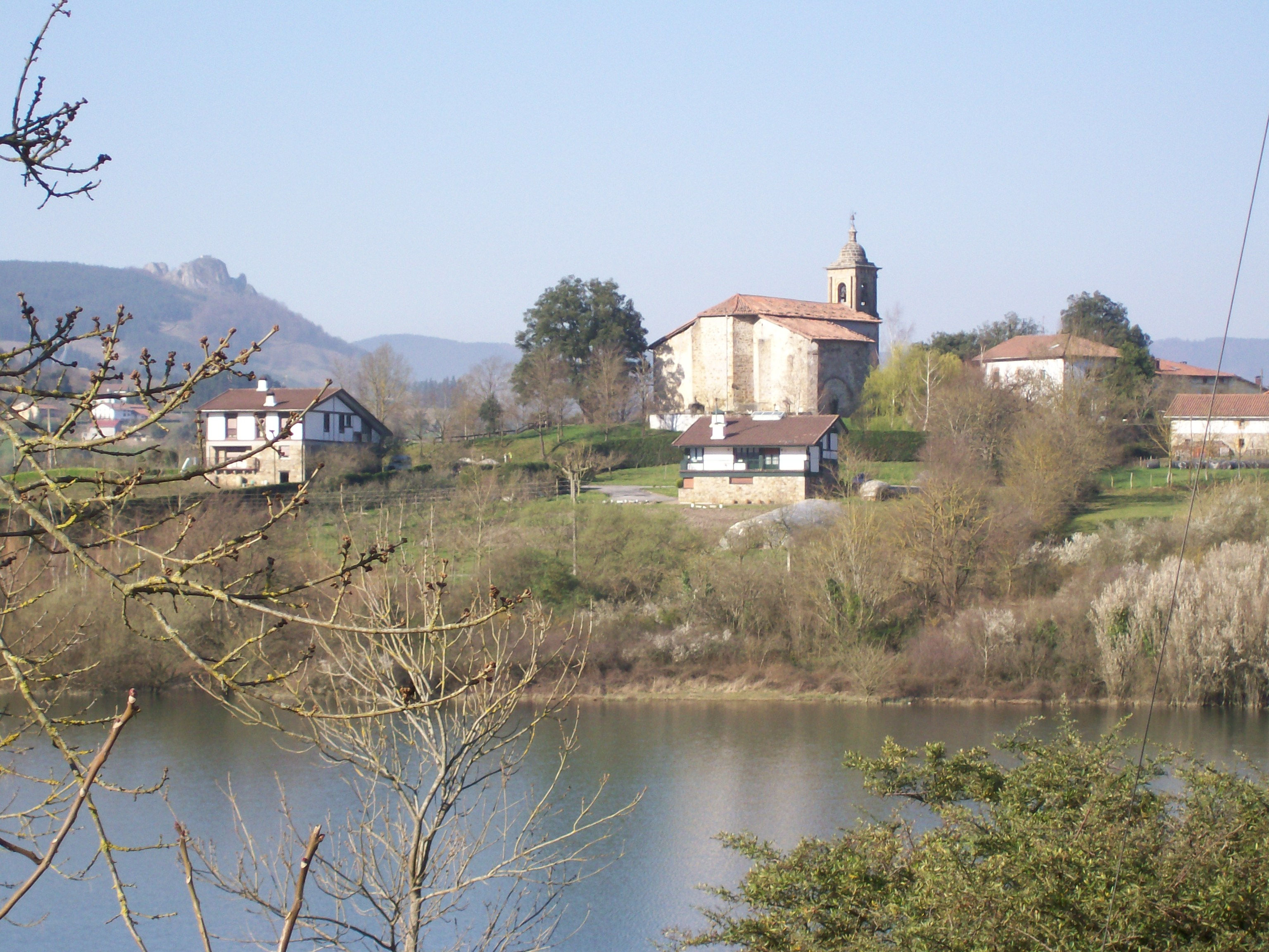 Aozaratza elizate aretxabaletarreko ikuspegi orokorra